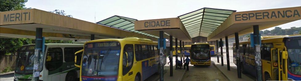 Rodoviaria